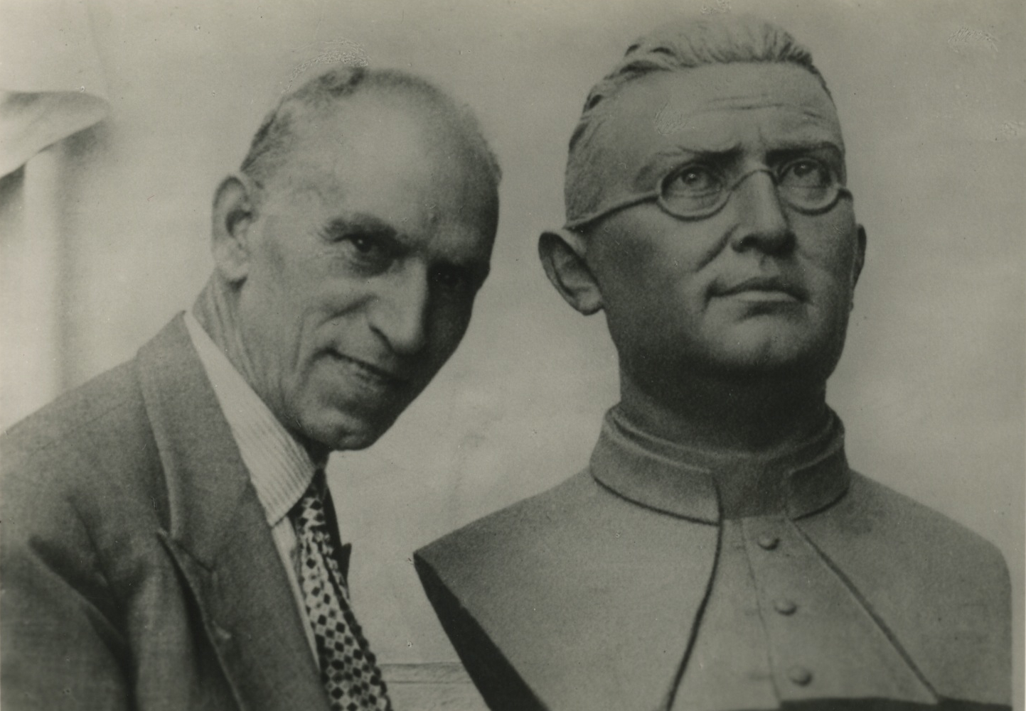 Salvatore Bruno, 1964